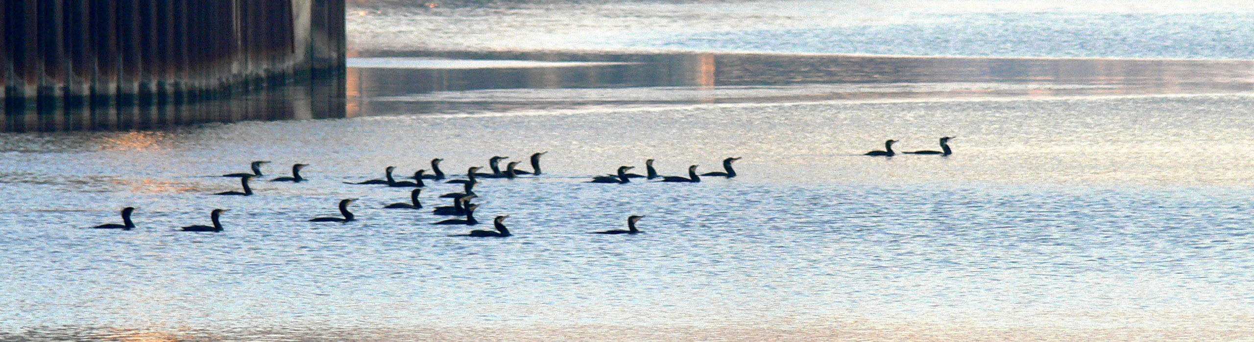 Rassemblement hivernal de cormorans sur la Deûle canalisée en aval de Lille, quelques centaines de mètres après l'écluse du Grand carré. Bien que l'eau soit encore assez polluée et très turbide, les cormorans semblent trouver, comme les hérons une nourriture abondante